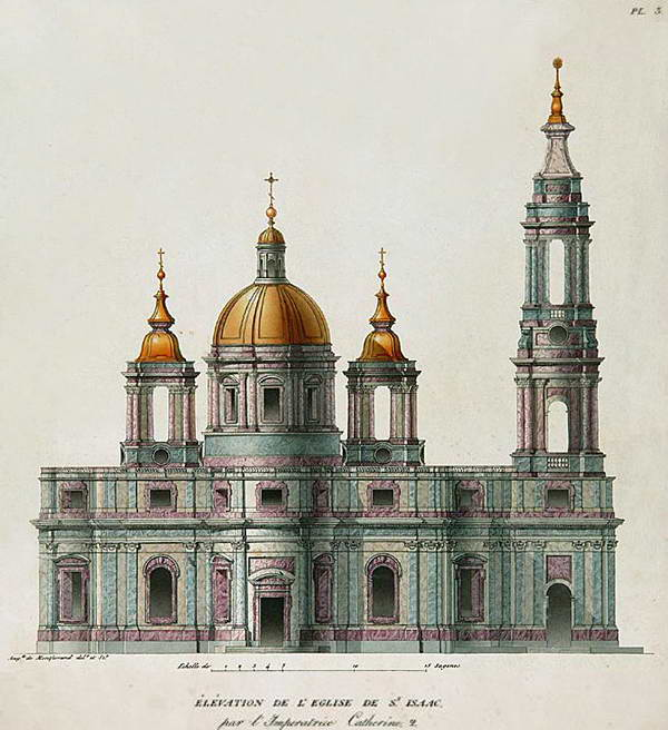 А. Ринальди - Собор преподобного Исаакия Далматского